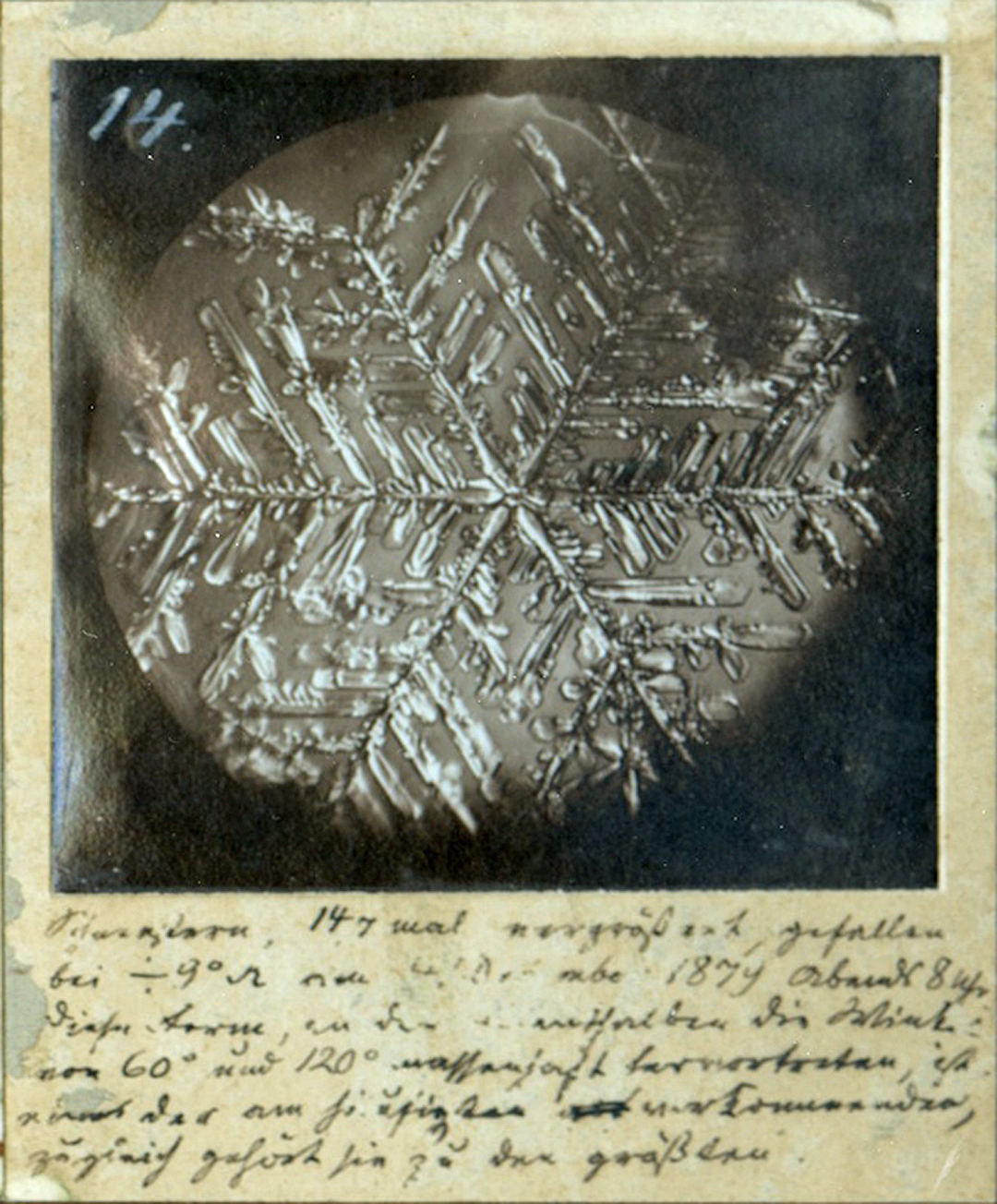 Schneekristall